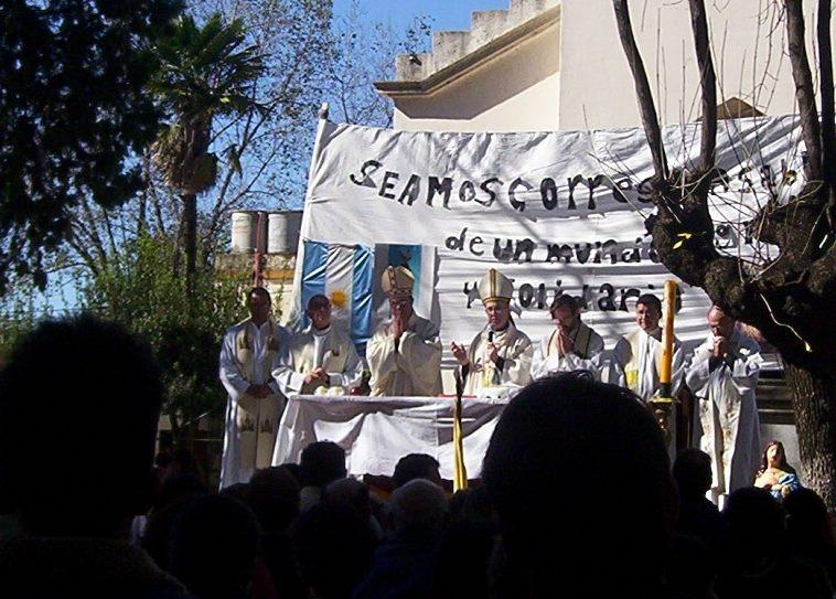 Celebración de una misa en la localidad de Pontevedra, Merlo, en 2007.